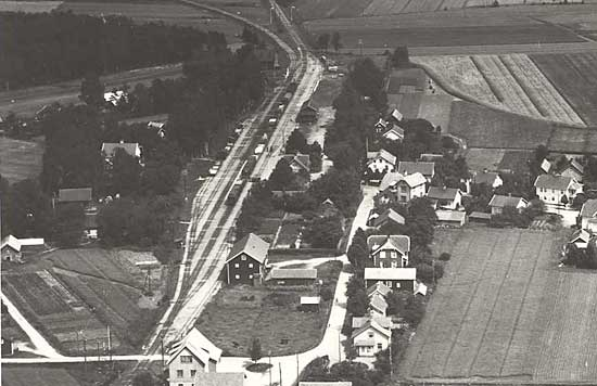 Bahnhof Tumleberg